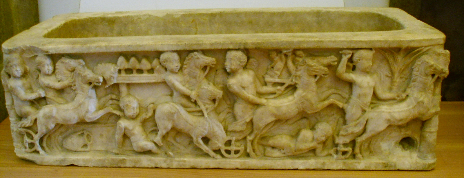 Sarcofago con amorini aurighi, conservato a Firenze. Seconda metà del II secolo d.C.